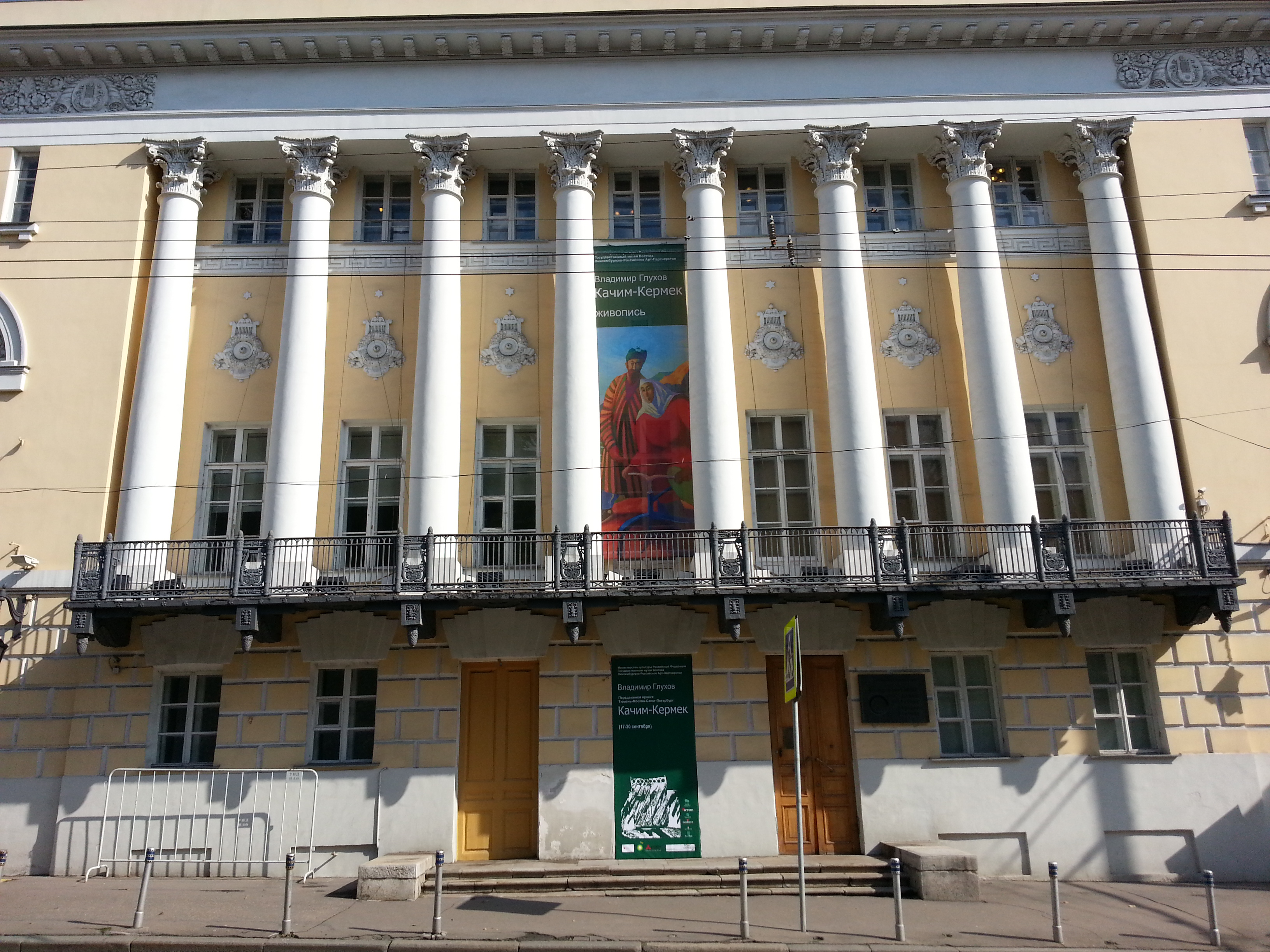 Усадьба Луниных (музей Востока) (Москва и Московская область, Москва, Никитский бульв., 12-а)